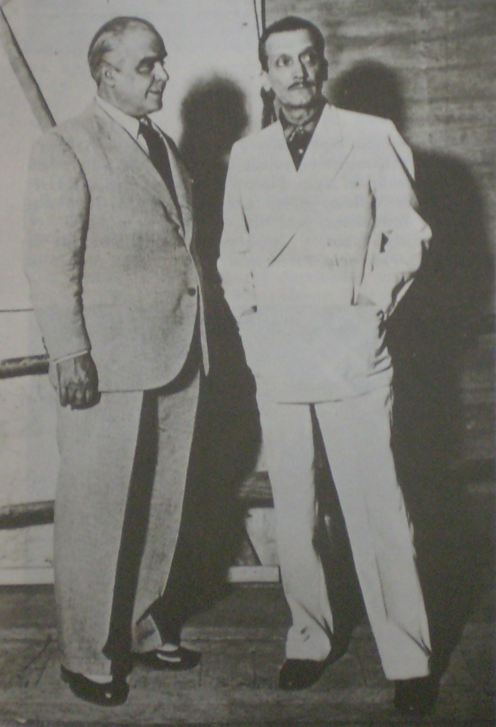 Enrique Muiño y Elías Alippi (1883—1942)